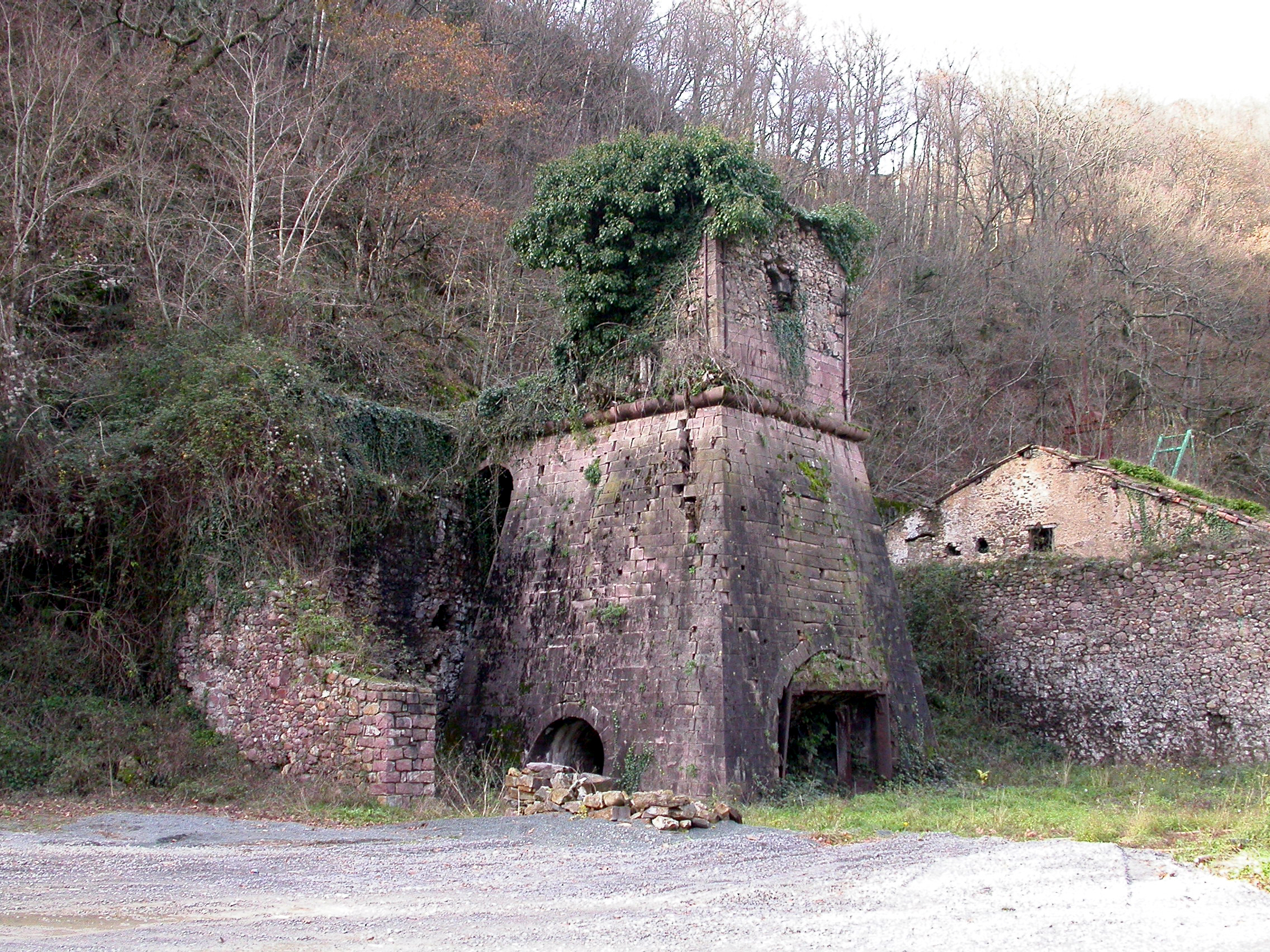 Mine de fer de Bancahaut fourneau, site archéologique (Inscrit) .